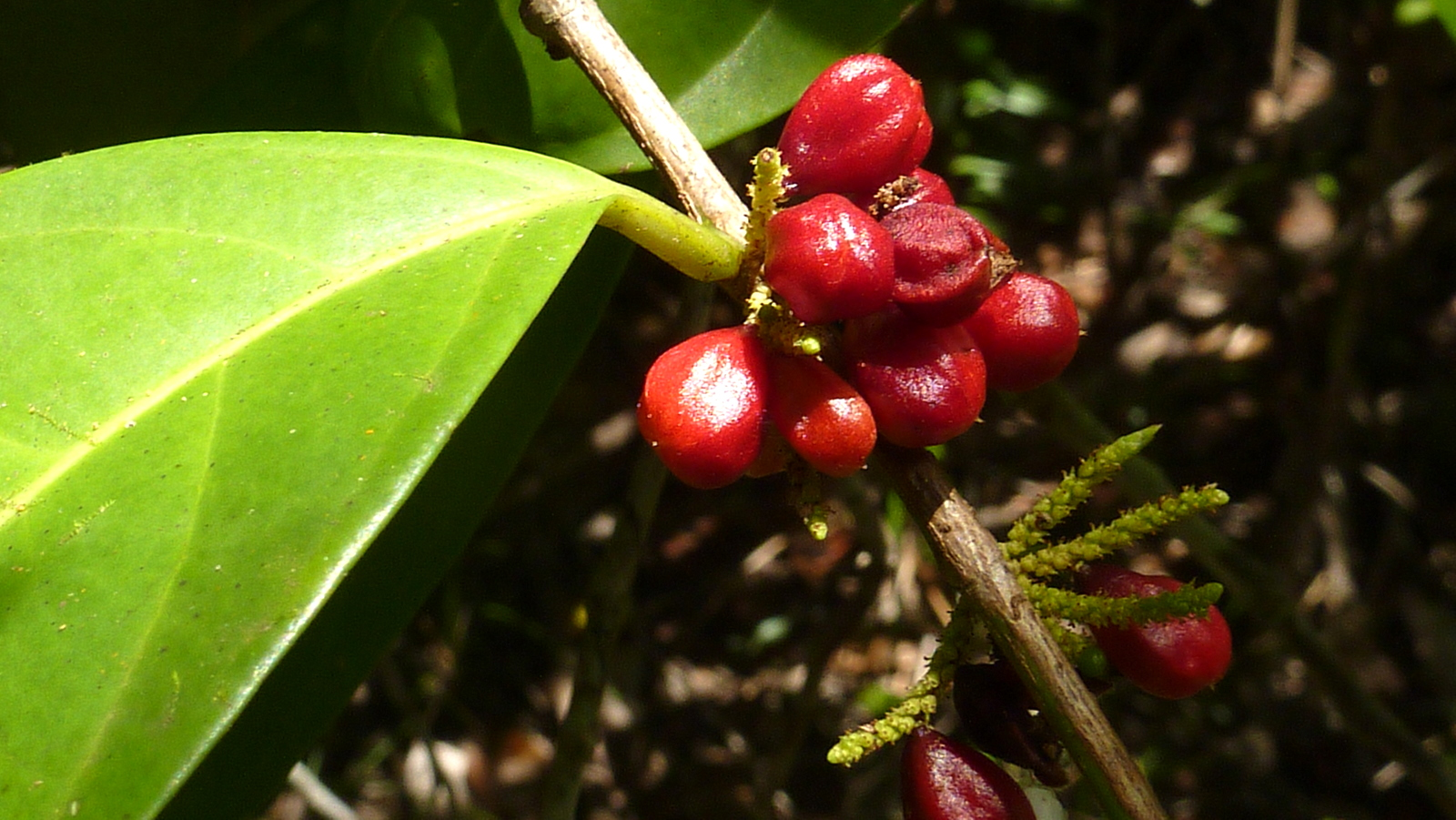 Lacistema hasslerianum Chodat